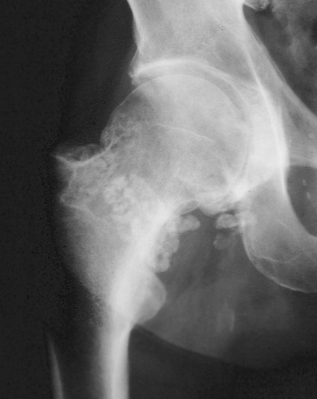 Synoviale Chondromatose des rechten Hüftgelenks